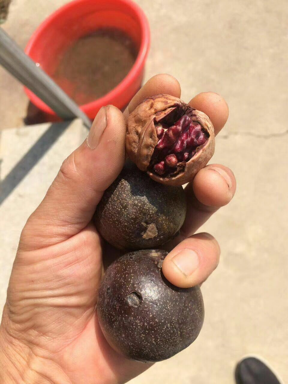 紫京核桃果